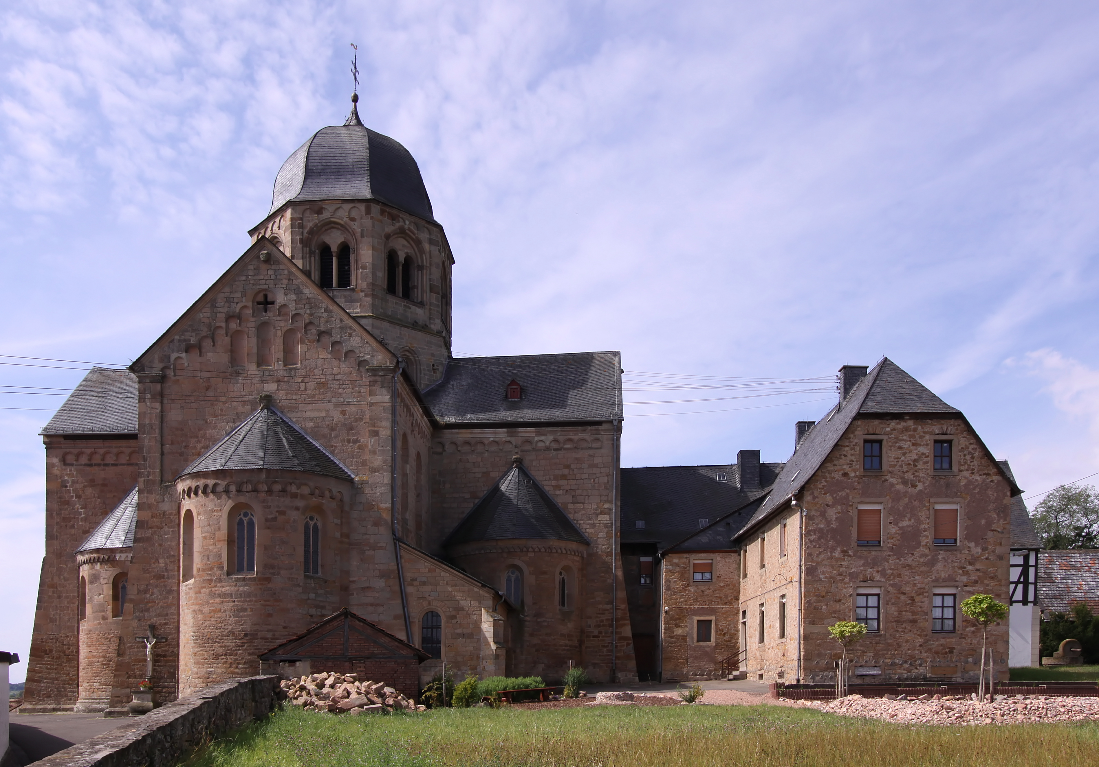 Sponheim bei Bad Kreuznach/Deutschland - ehemalige Klosterkirche und heutige katholische Pfarrkirche „St. Maria“ und „St. Martin“ aus dem 12. Jahrhundert